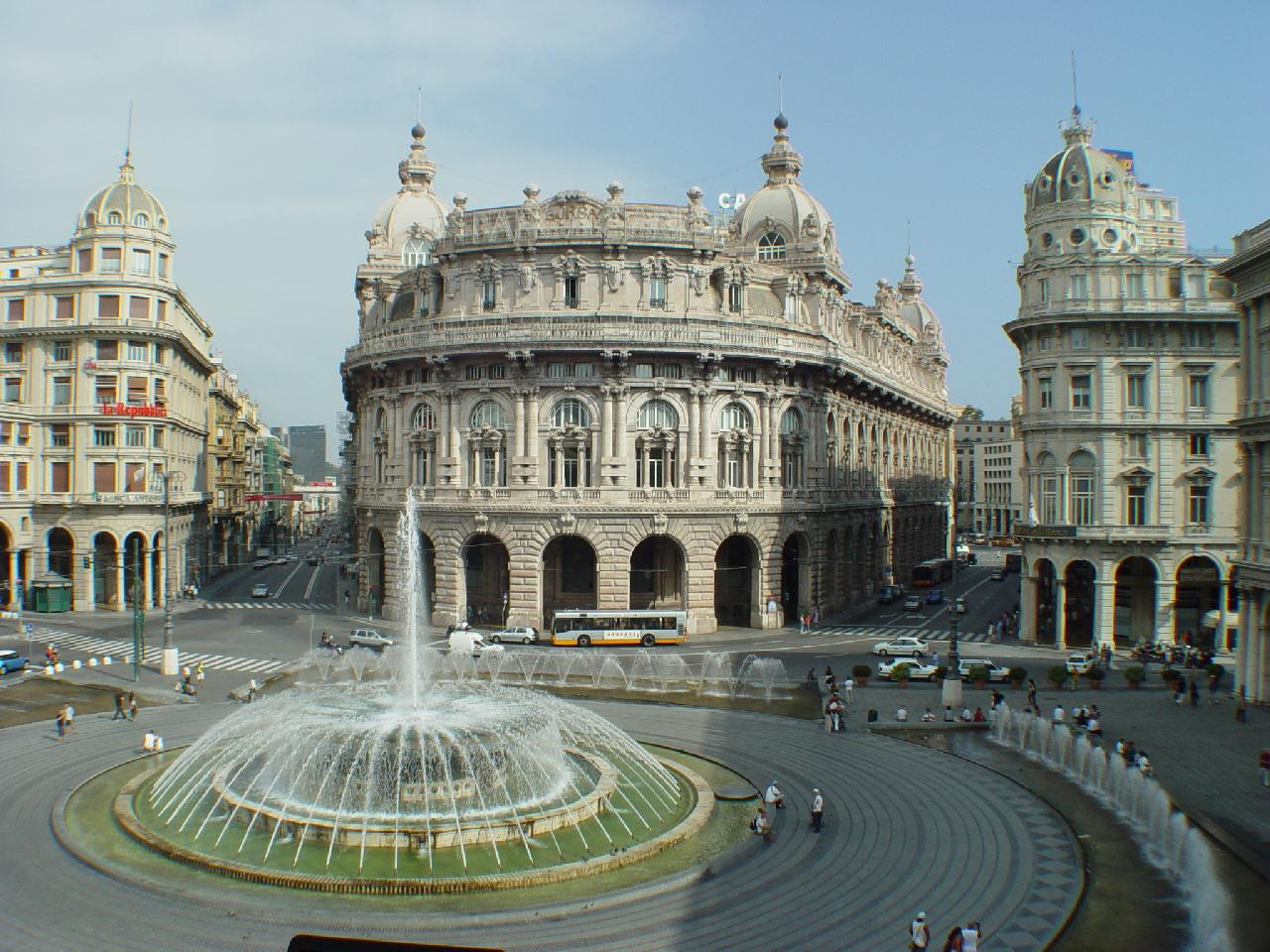 Genova - Piazza De Ferrari